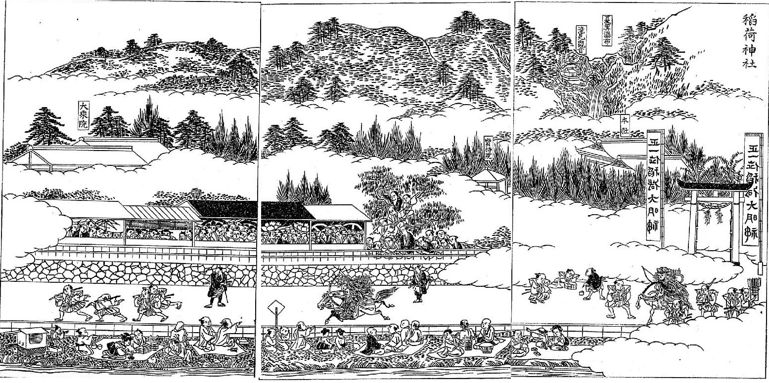 三国名勝図会第三巻に掲載されている稲荷神社の江戸期の絵図。